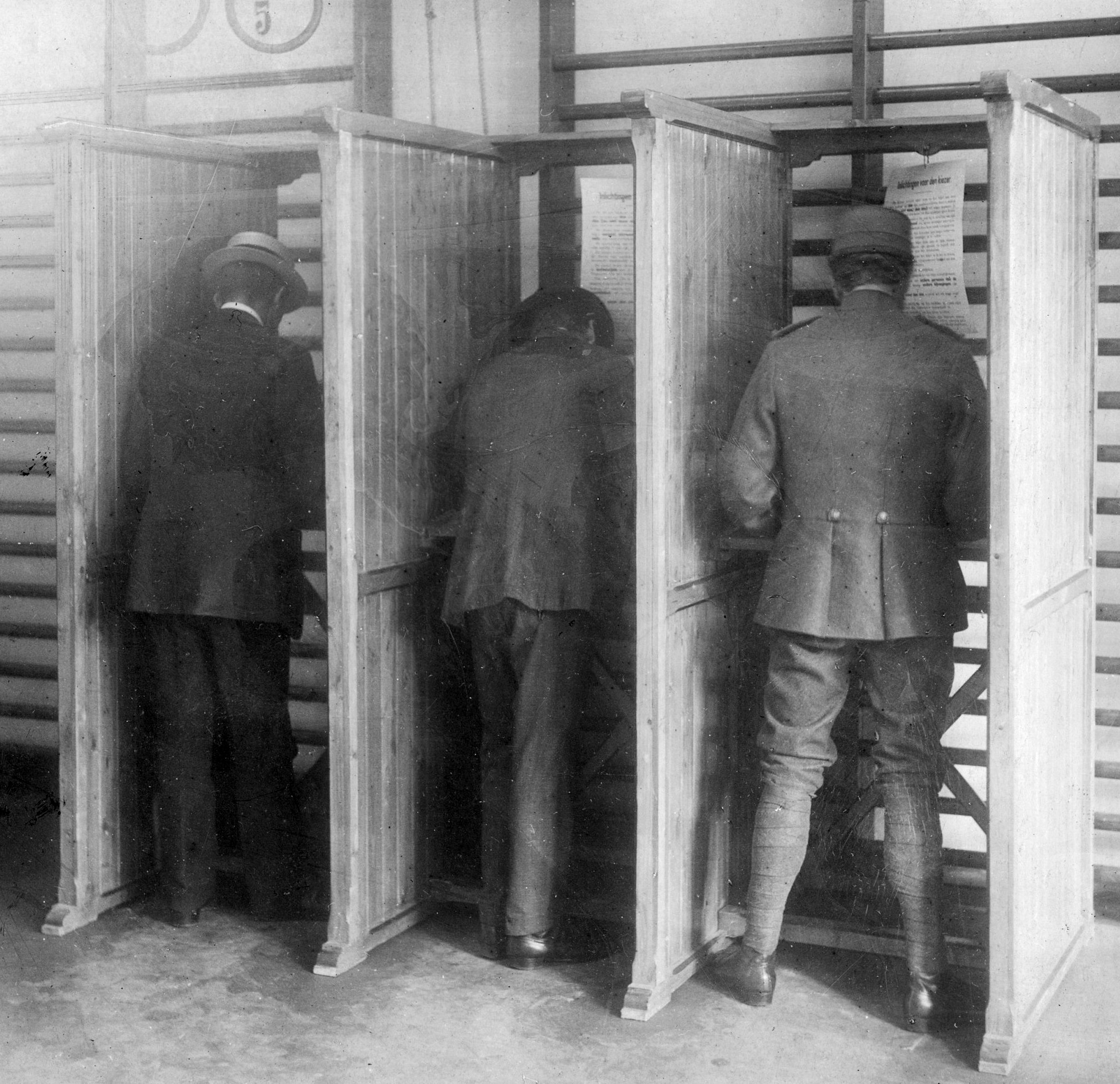 Stemmen in een stemhokje bij de verkiezingen van 1918, Nederland.